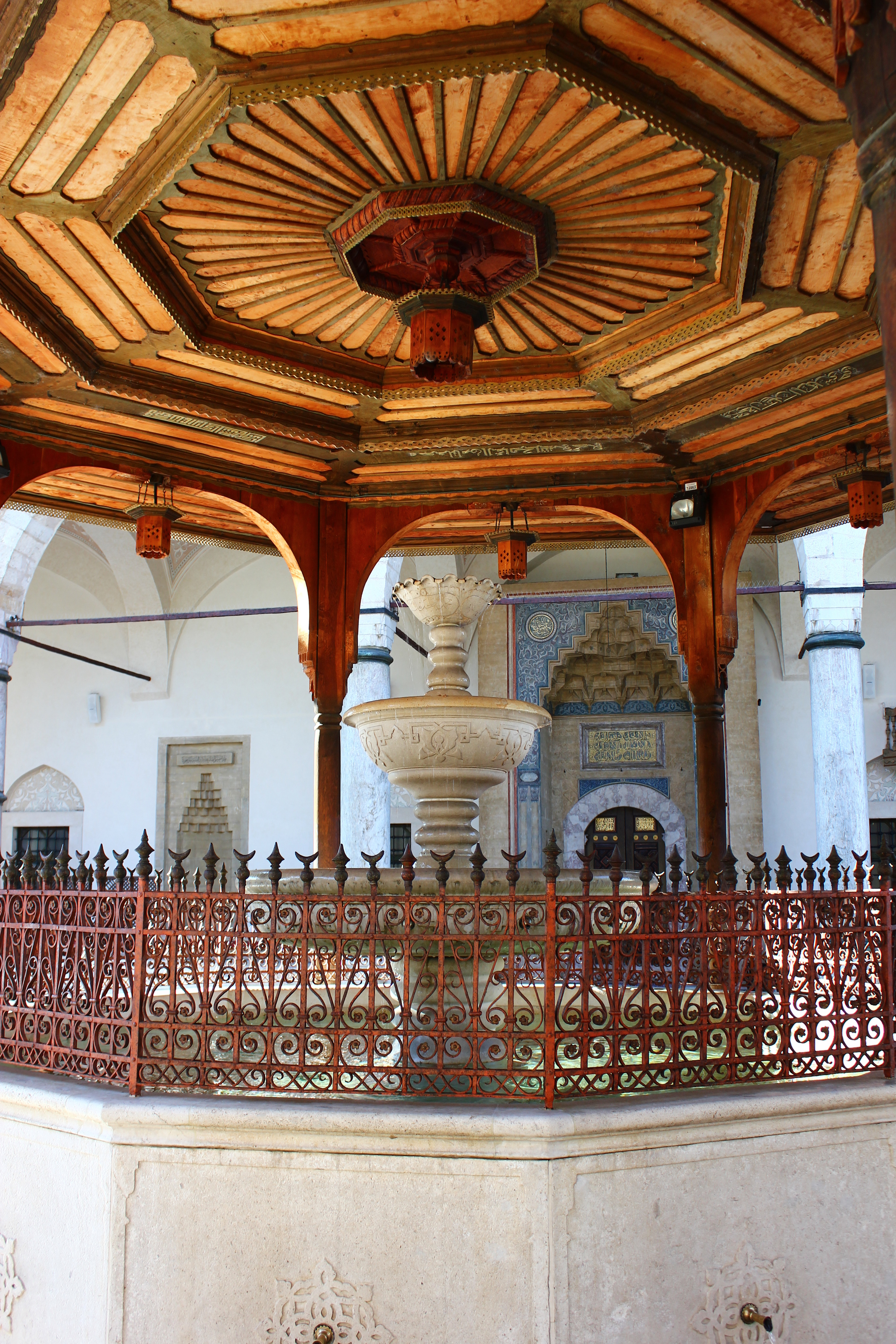 Brunnen auf dem Hof der Gazi-Husrev-Beg-Moschee in Sarajevo.